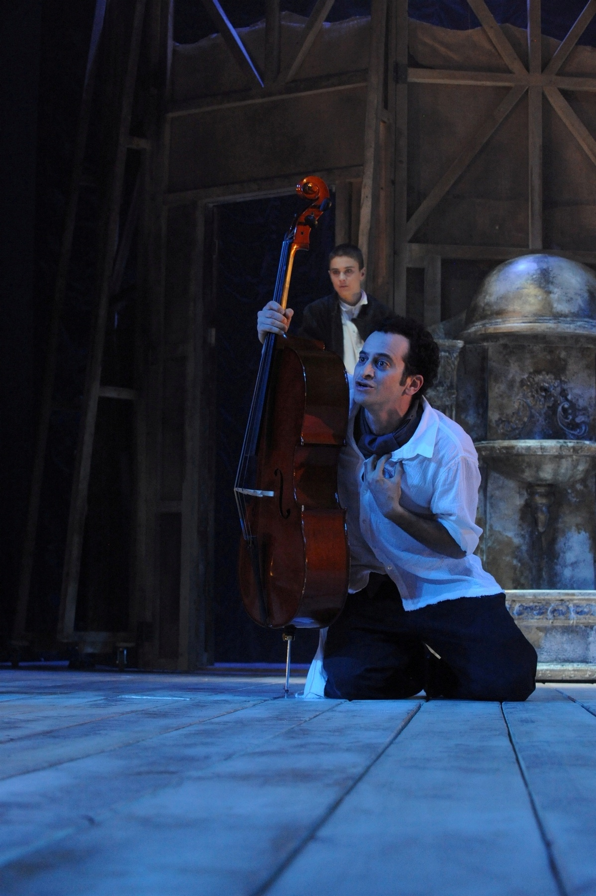 אורי יניב בהצגה בתיאטרון גשר